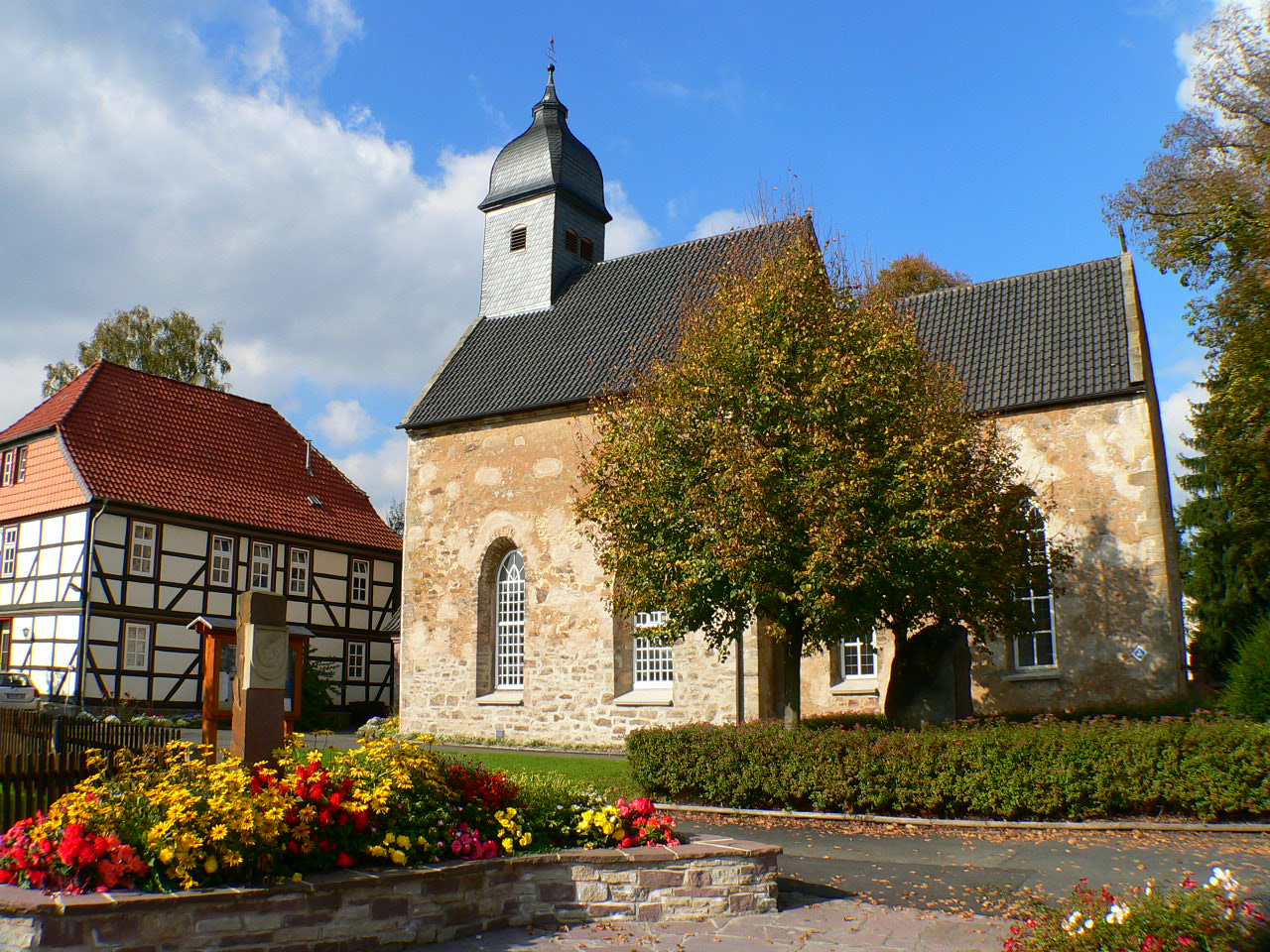 Wehrkirche in Gimte